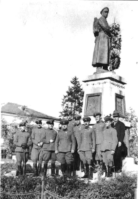 Паметникът на загиналите за Отечеството. Открит на 20 октомври 1929 година